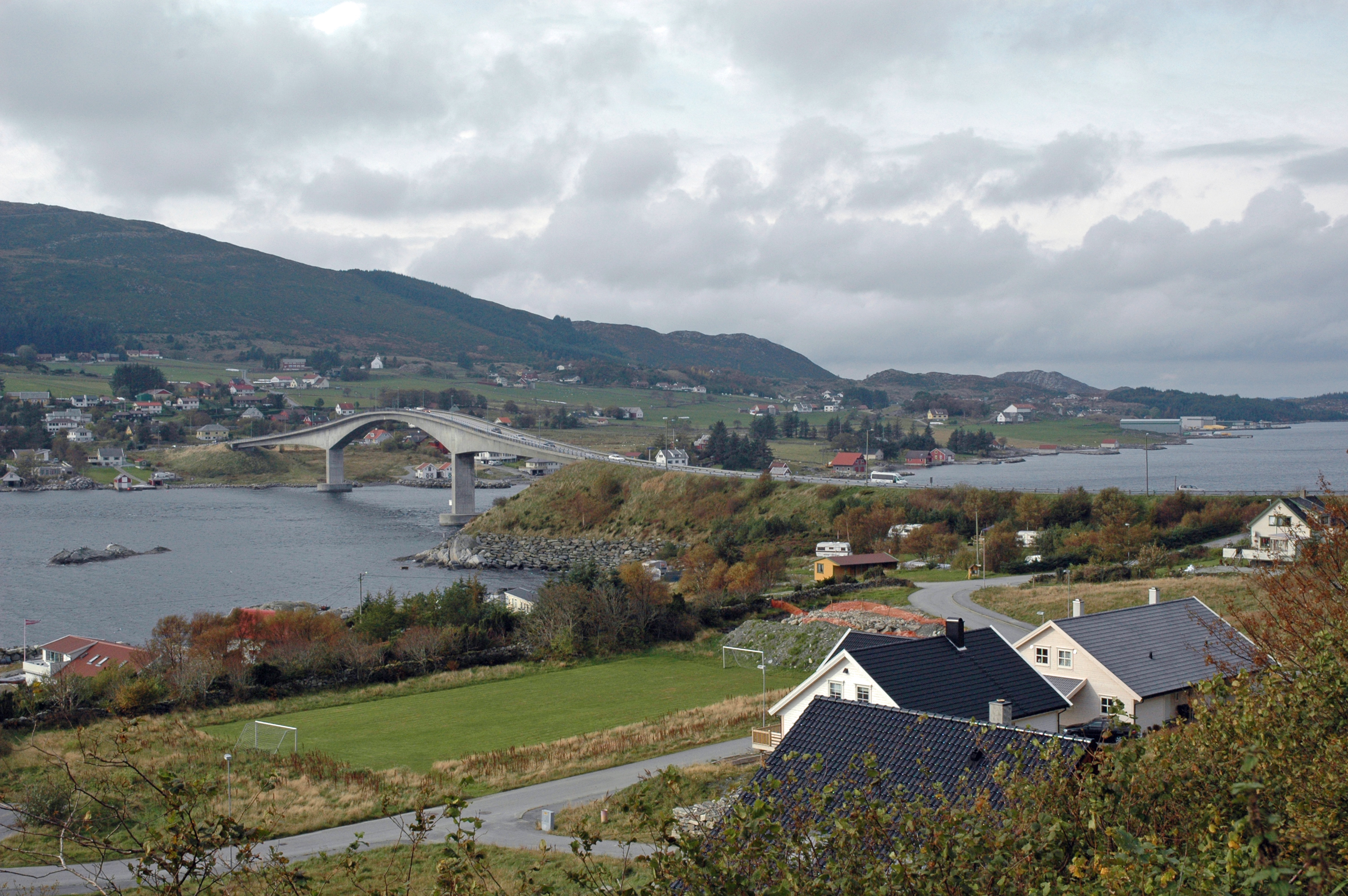 Bokn og Boknasundbrua sett fra Austre Bokn